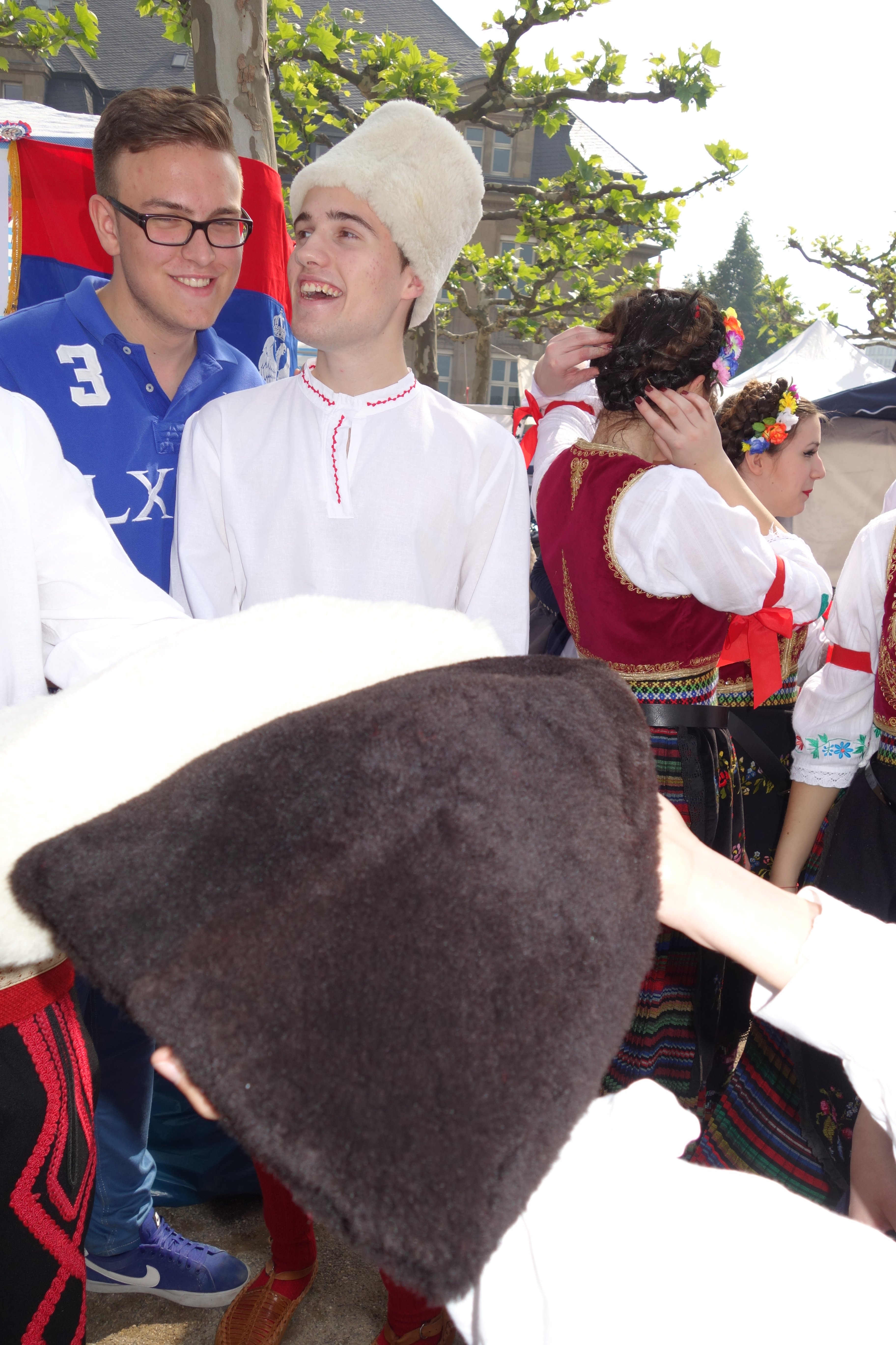 Serbische Volkstanzgruppe mit Lammfellmützen „Šubara“ (Шубара). Zur Maifeier 2014 in Düsseldorf auf dem Johannes-Rau Platz.